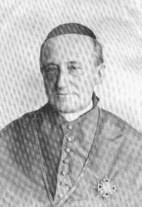 Vilém Blažek (1837 - 1912), Český římskokatolický kněz.